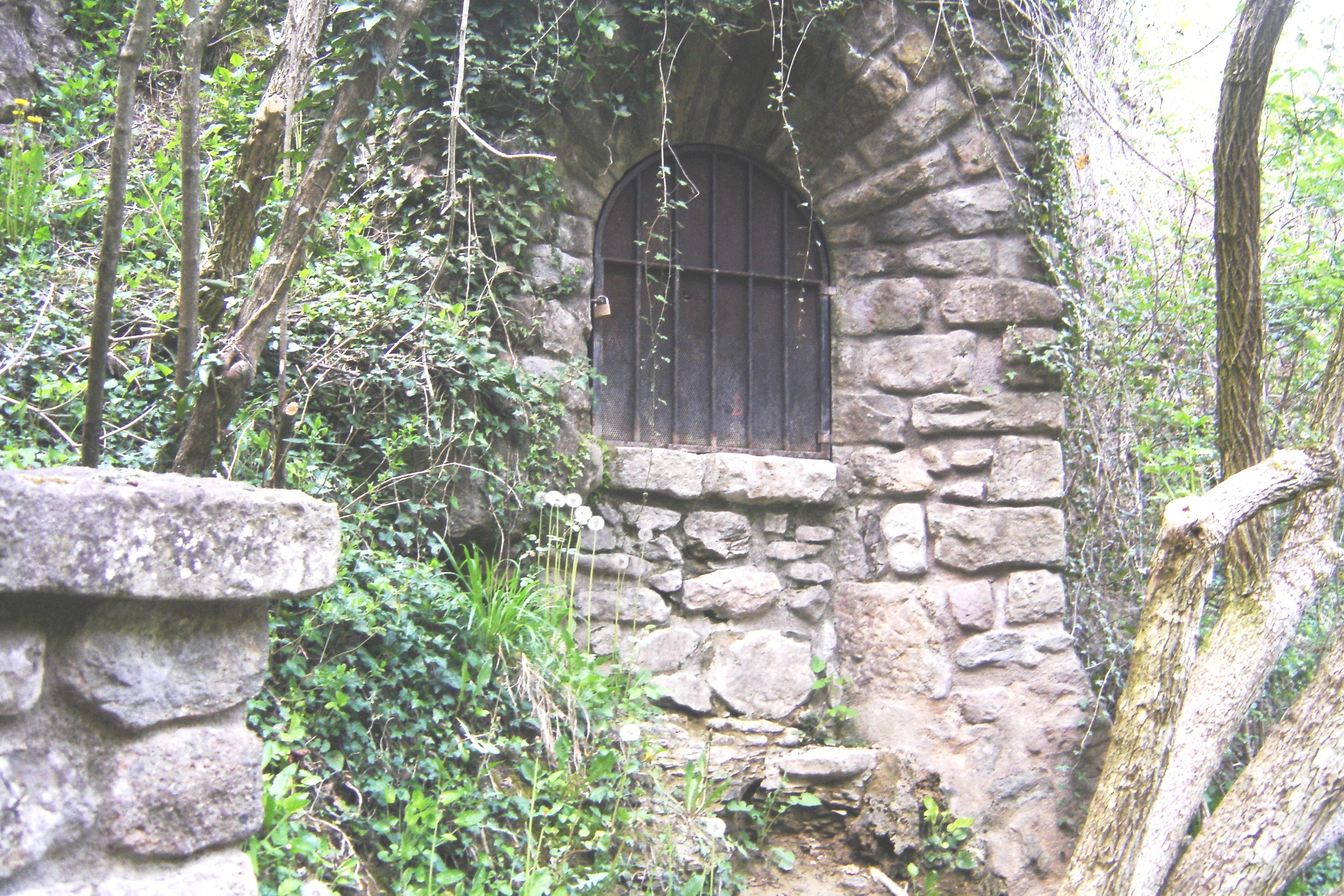 L'entorn de la font de la Mina, a Solsona (Solsonès). L'entrada a la mina